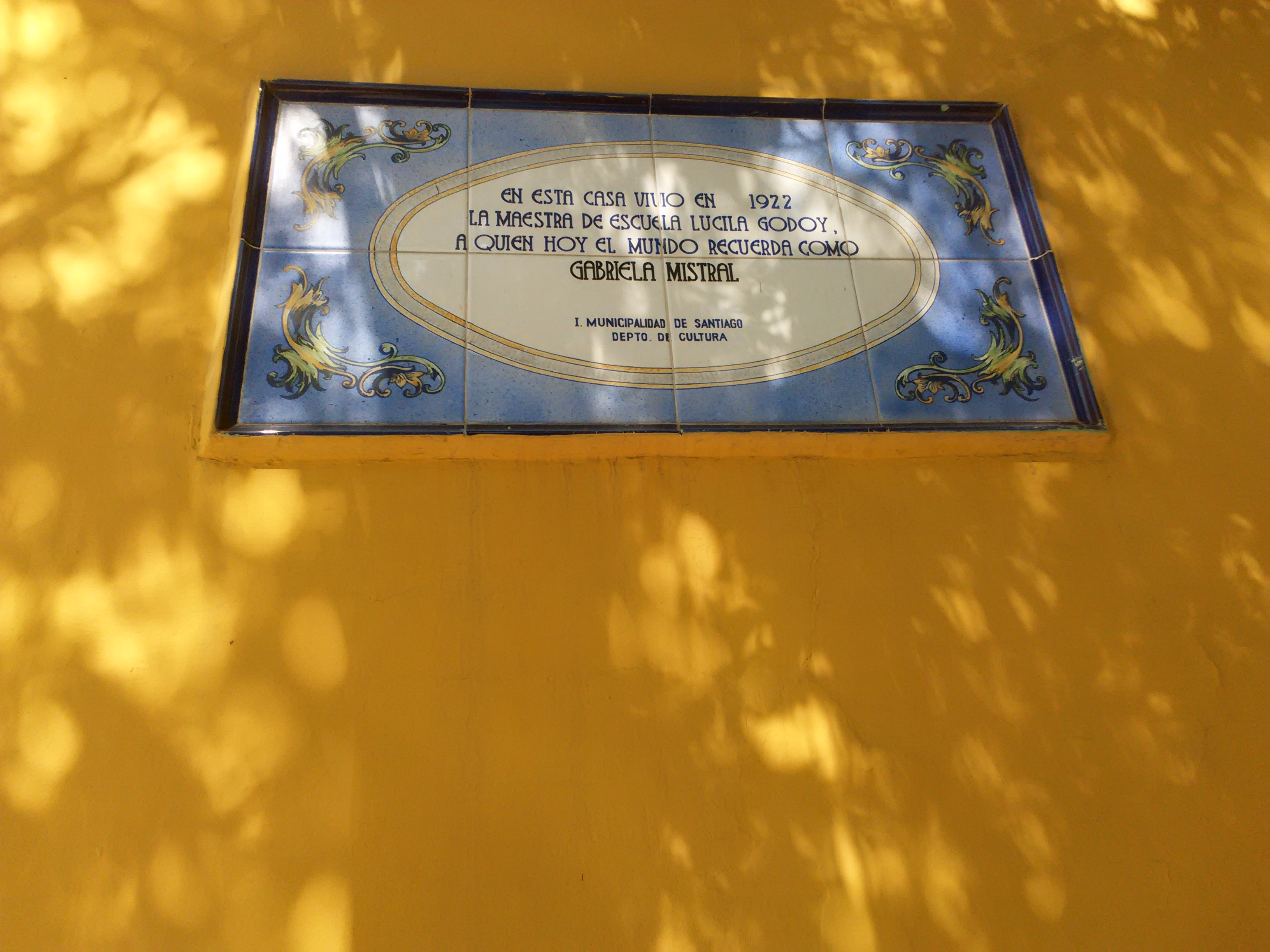 Casa donde residió Gabriela Mistral en Barrio Franklin, Santiago de Chile